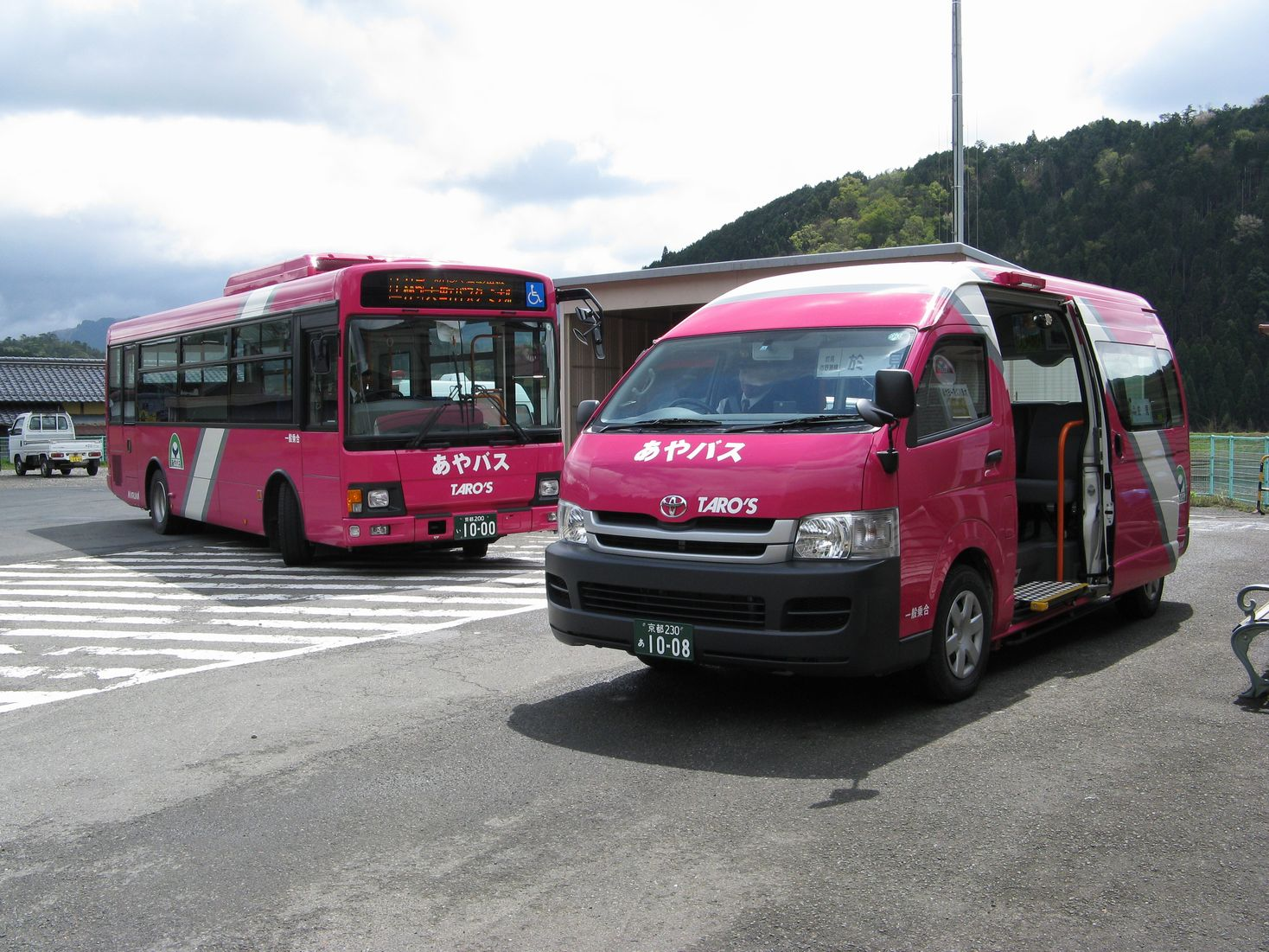 あやべ市民バス（あやバス） 大町バスターミナルにて上林線バスが乗換え接続